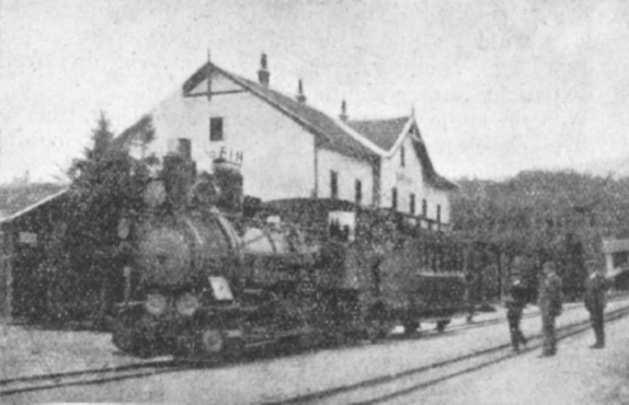 Zug der Narentabahn mit einer Lokomotive der Reihe IIIc5 in der Station Tarčin